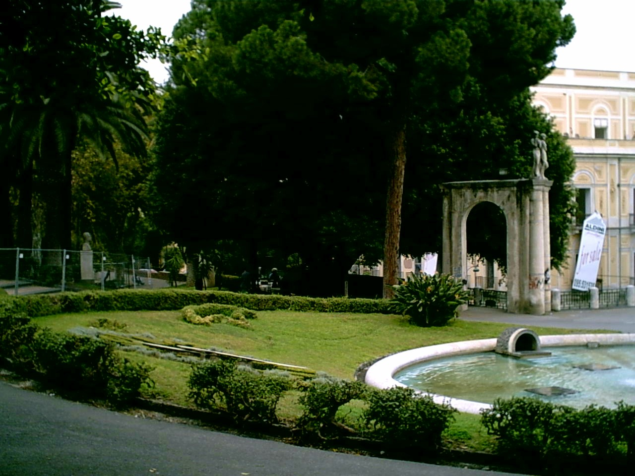 Foto paesaggistica